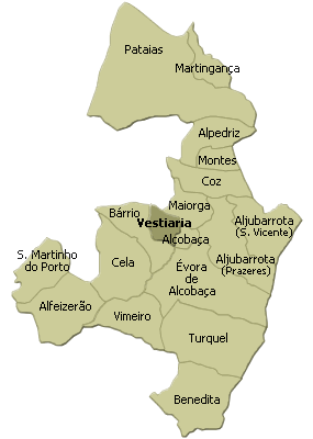 localisation de vestiaria sur la freguesia de alcobaça